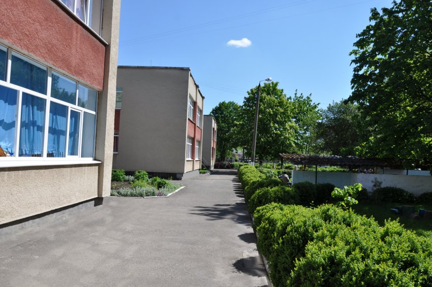 ДНЗ Золотий ключик